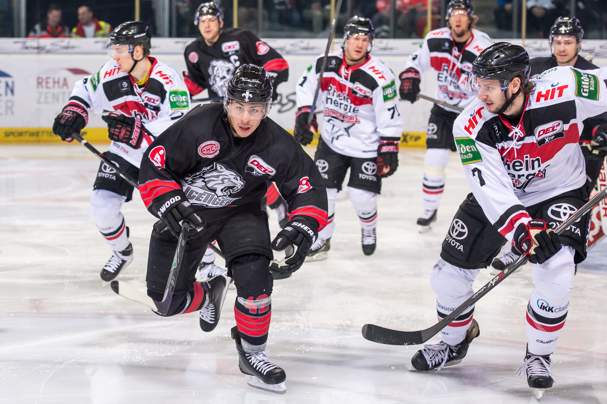 Andreas Holmqvist,Arena Nürnberger Versicherungen,DEL,Eishockey,Kölner Haie,Thomas Sabo Ice Tigers Nürnberg,Yasin Ehliz